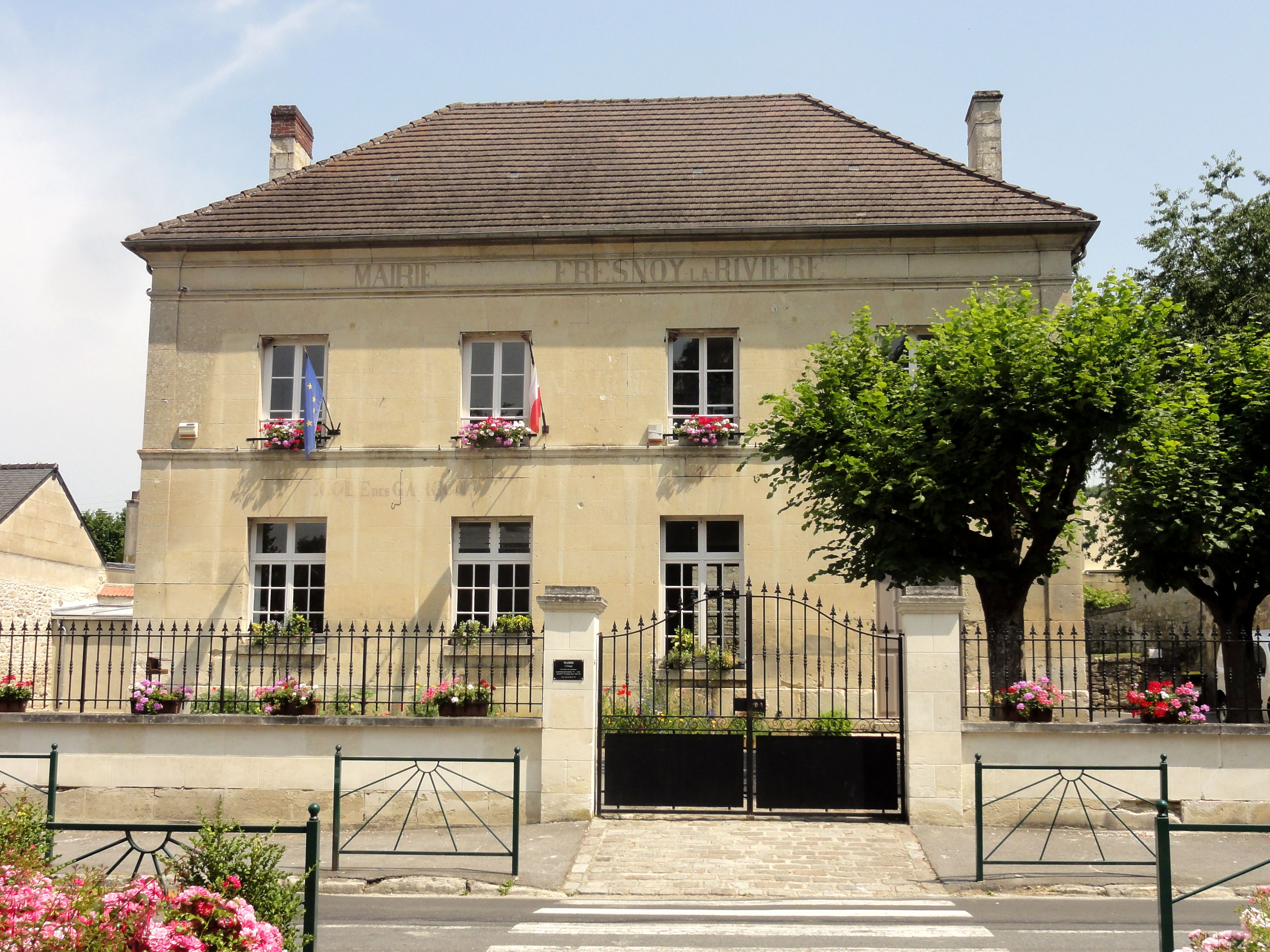 La mairie, rue de l'Automne.